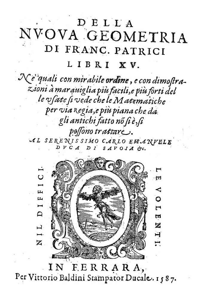 Della nuoua geometria di Franc. Patrici libri 15. ne' quali con mirabile ordine e con dimostrazioni à marauiglia più facili, e più forti delle vsate si vede che le matematiche per via regia, e più piana che dagli antichi fatto no[n] si è, e si possono trattare .... - In Ferrara : per Vittorio Baldini stampator ducale, 1587 (In Ferrara : appresso Vittorio Baldini stampator ducale, 1587). - [8], 227, [3] p. : ill. ; 4º .